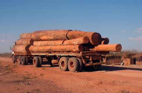 Alto Boavista (Mato Grosso) - Holz, das illegal im Indioreservat geschlagen wurde, wird über die BR 158 abtransportiert Fotograf: Wilson Dias/Abr. Datum: 17. August 2004 Die Agência Brasil erlaubt die Verbreitung ihrer Fotos unter der GNU-FDL, so lange die Herkunft mit Agência Brasil und dem Namen des Fotografen angegeben ist.